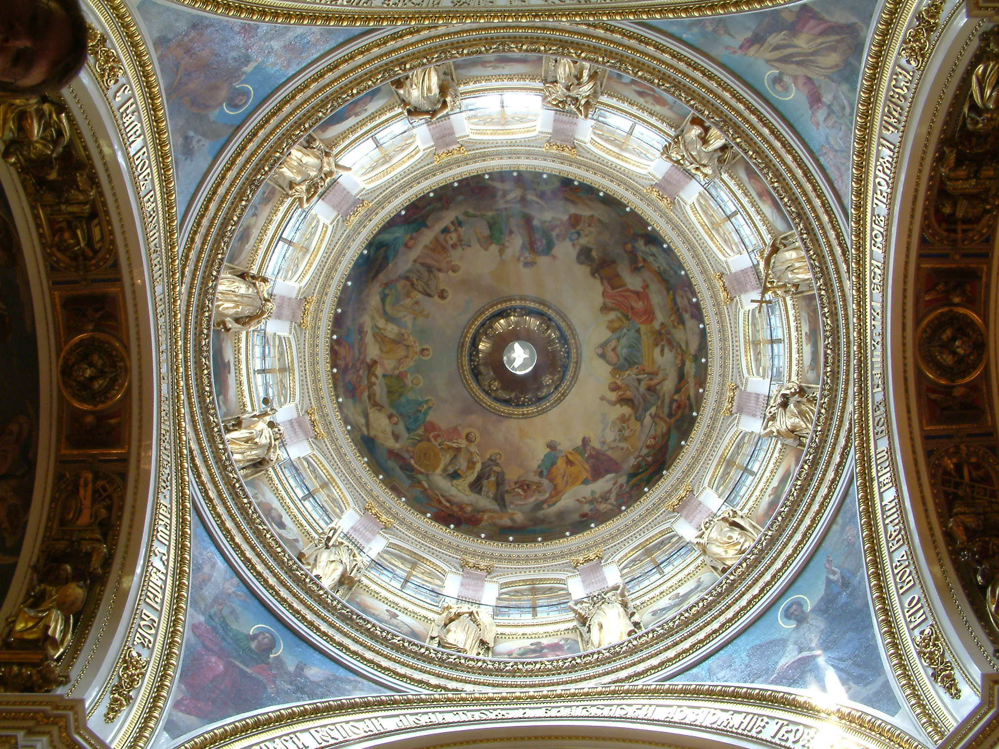 Kuppel der Isaaks-Kathedrale in St.Petersburg